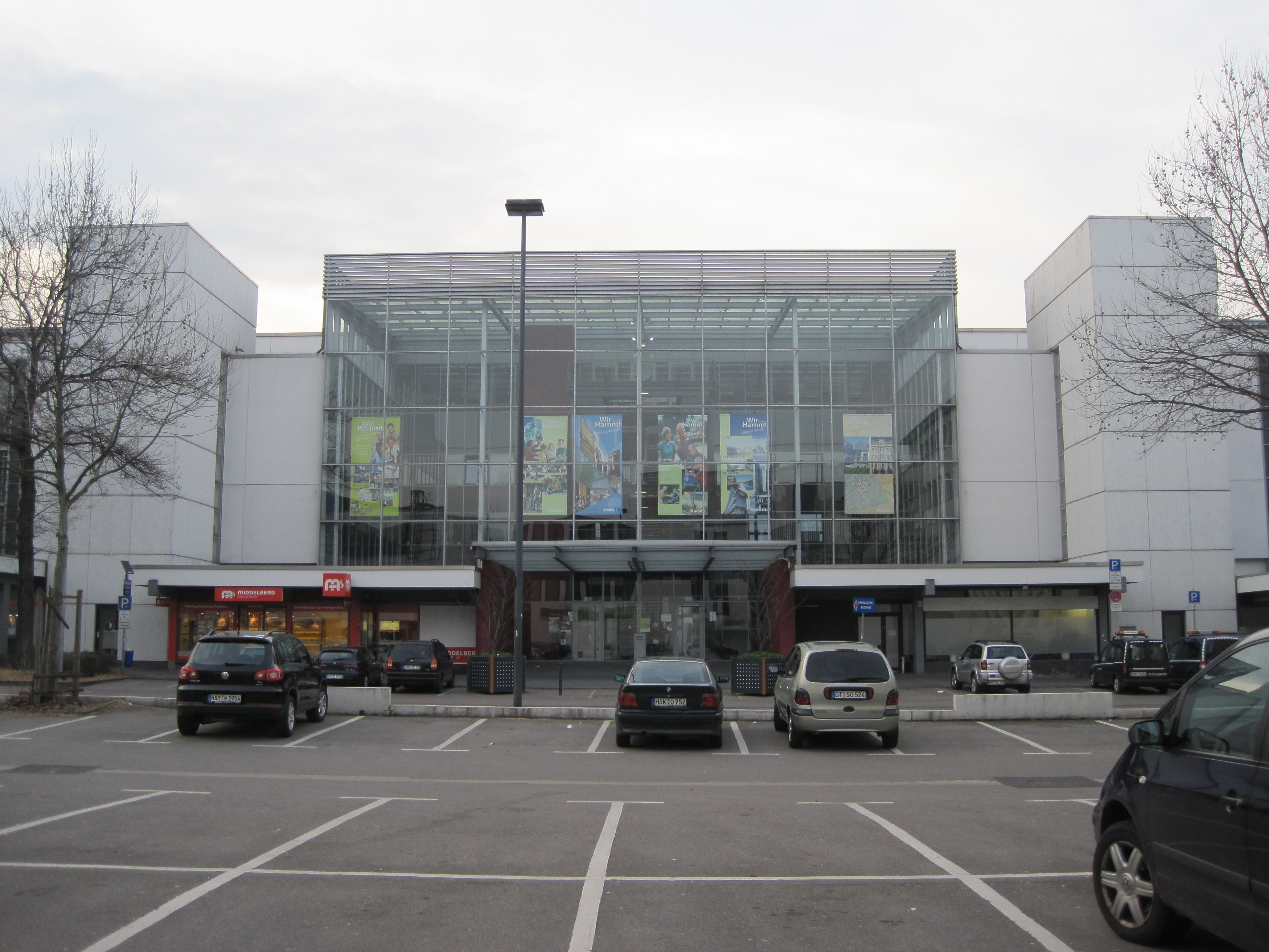 Das Foto zeigt den Haupteingangsbereich des Technischen Rathauses Hamm mit Blick vom Kaufhofparkplatz aus.